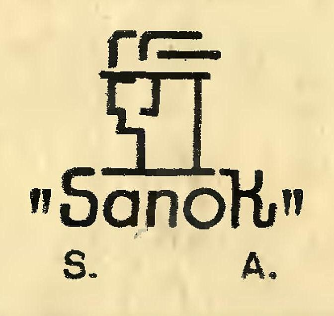 Ogłoszenie reklamowe "Sanok Polska Spółka dla Przemysłu Gumowego" przed 1939.